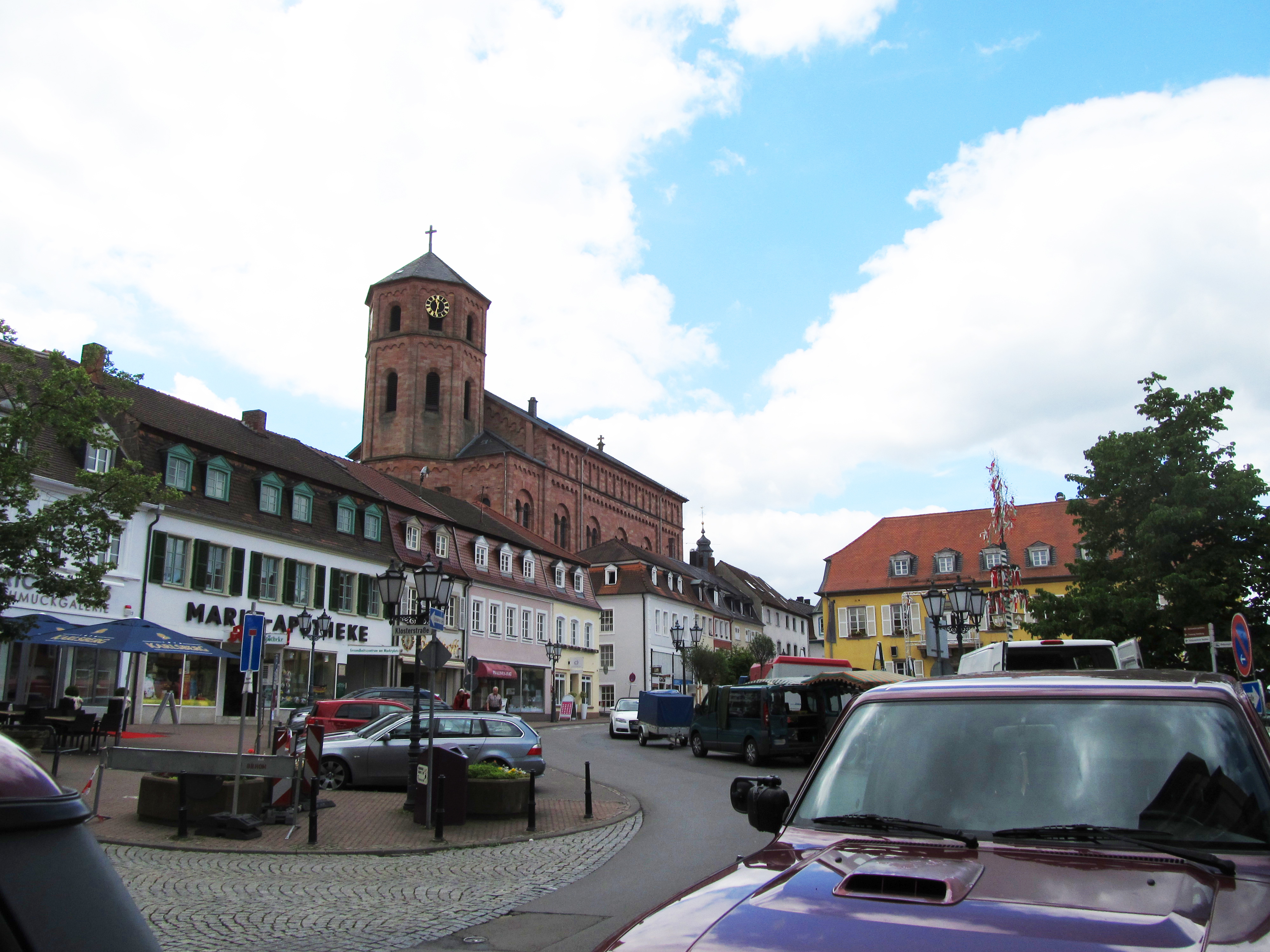 Blick auf den Marktplatz in der Altstadt von Homburg, Saarland